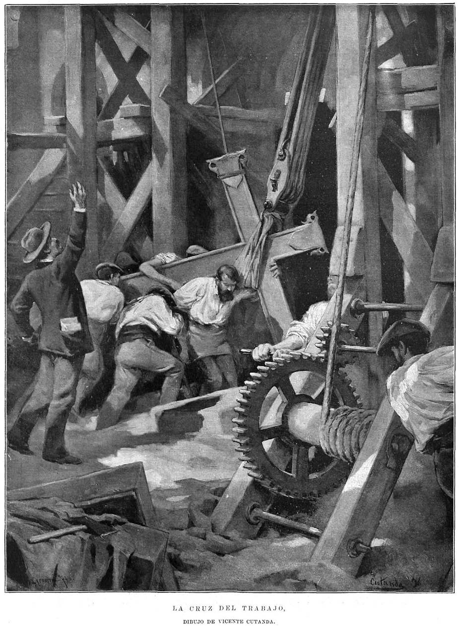 La cruz del trabajo, dibujo de Vicente Cutanda, grabado de Laporta, recogido en la revista española La Ilustración Española y Americana.